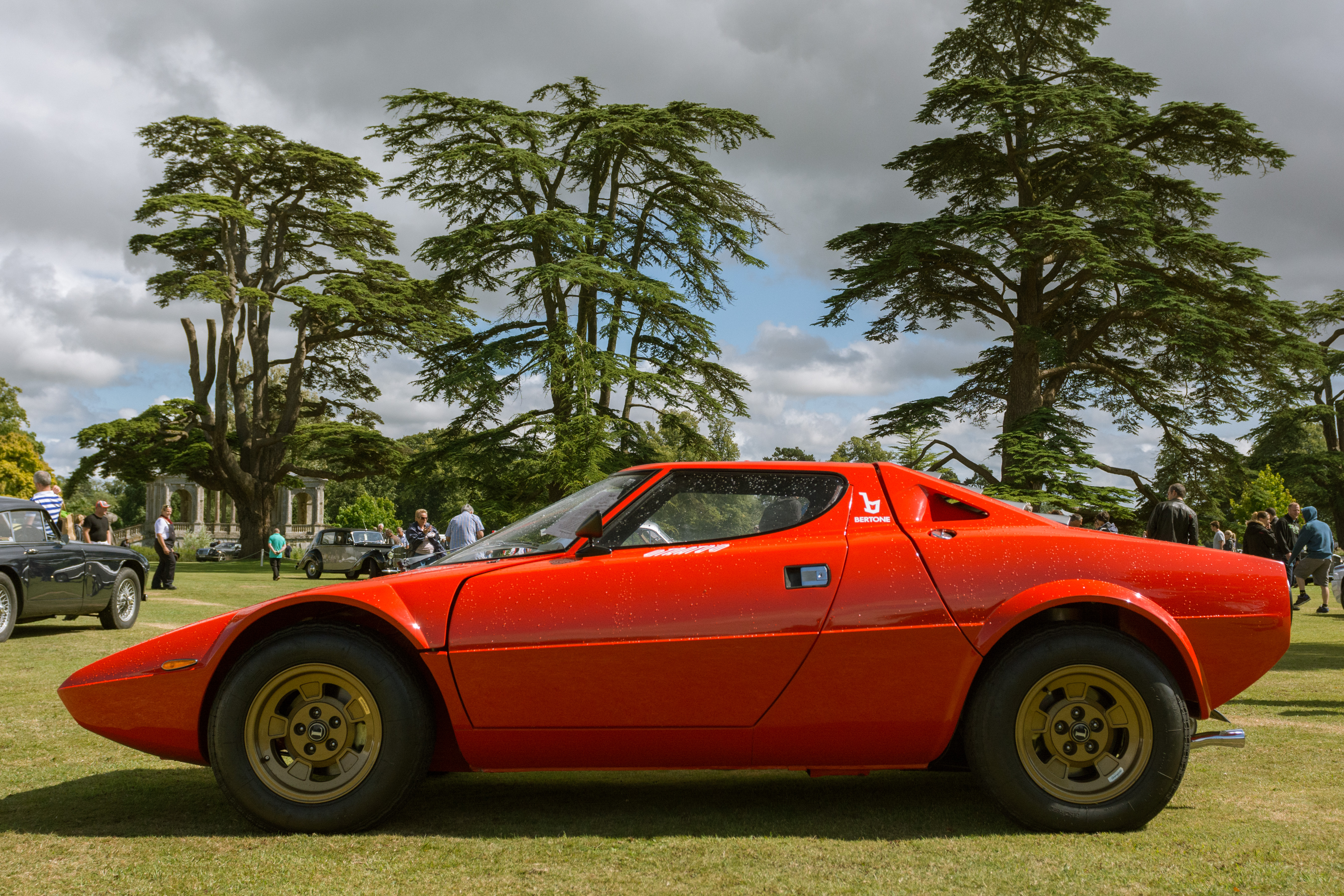 Lancia Stratos HF Stradale at Wilton classic supercar 2014